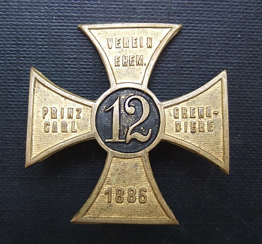 Verein des ehemaligen Prinz Carl Grenadier- Regiments Nr. 12